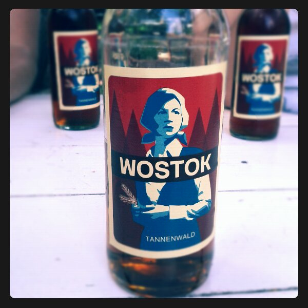 Wostok